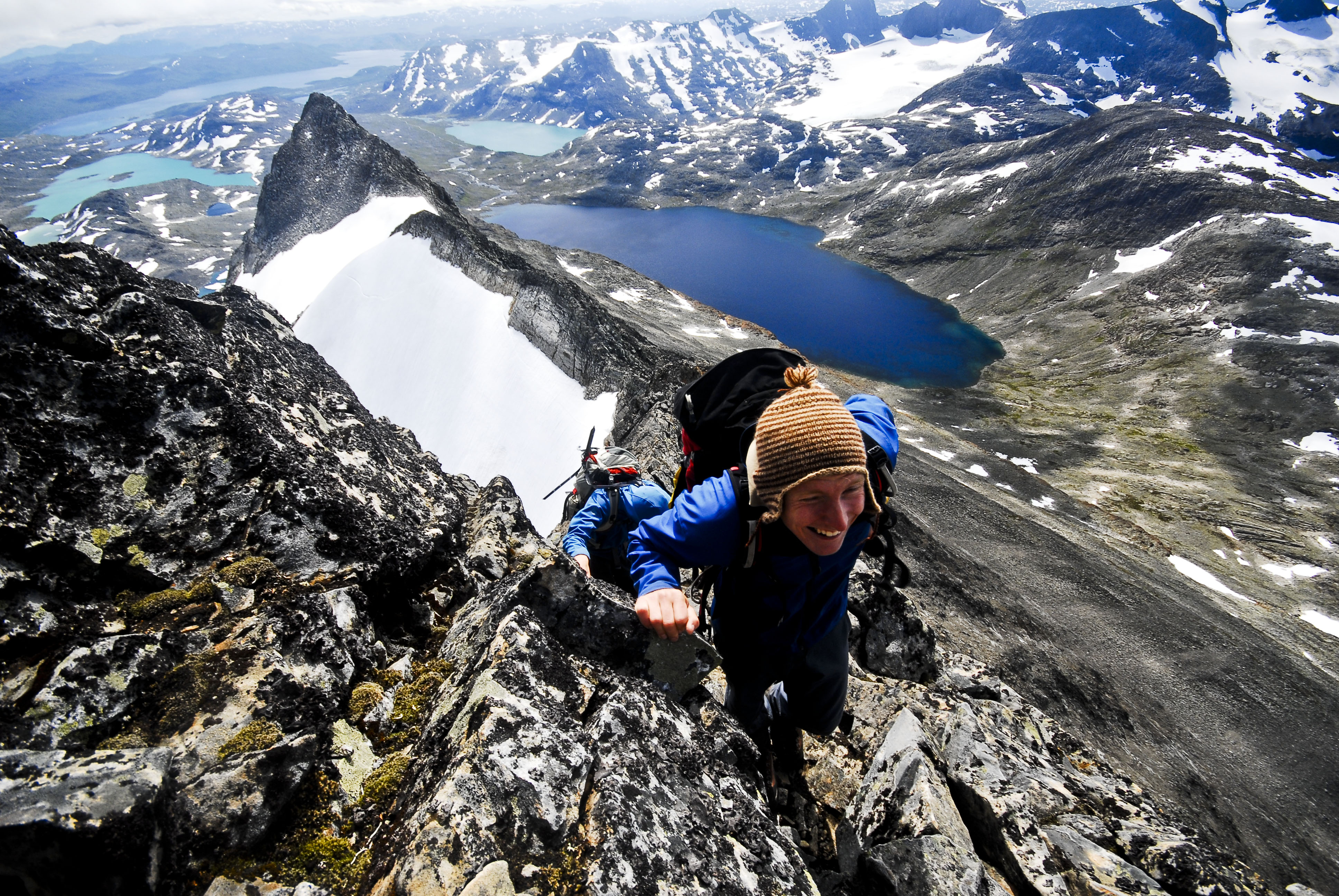 Foto: Jon Olav Volden